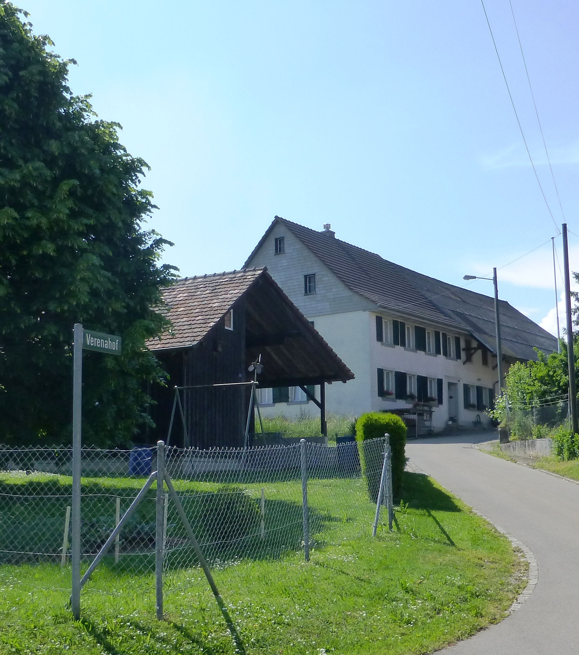 Im Jahre 2015 ist "Verenahof" nur noch ein Straßenname.